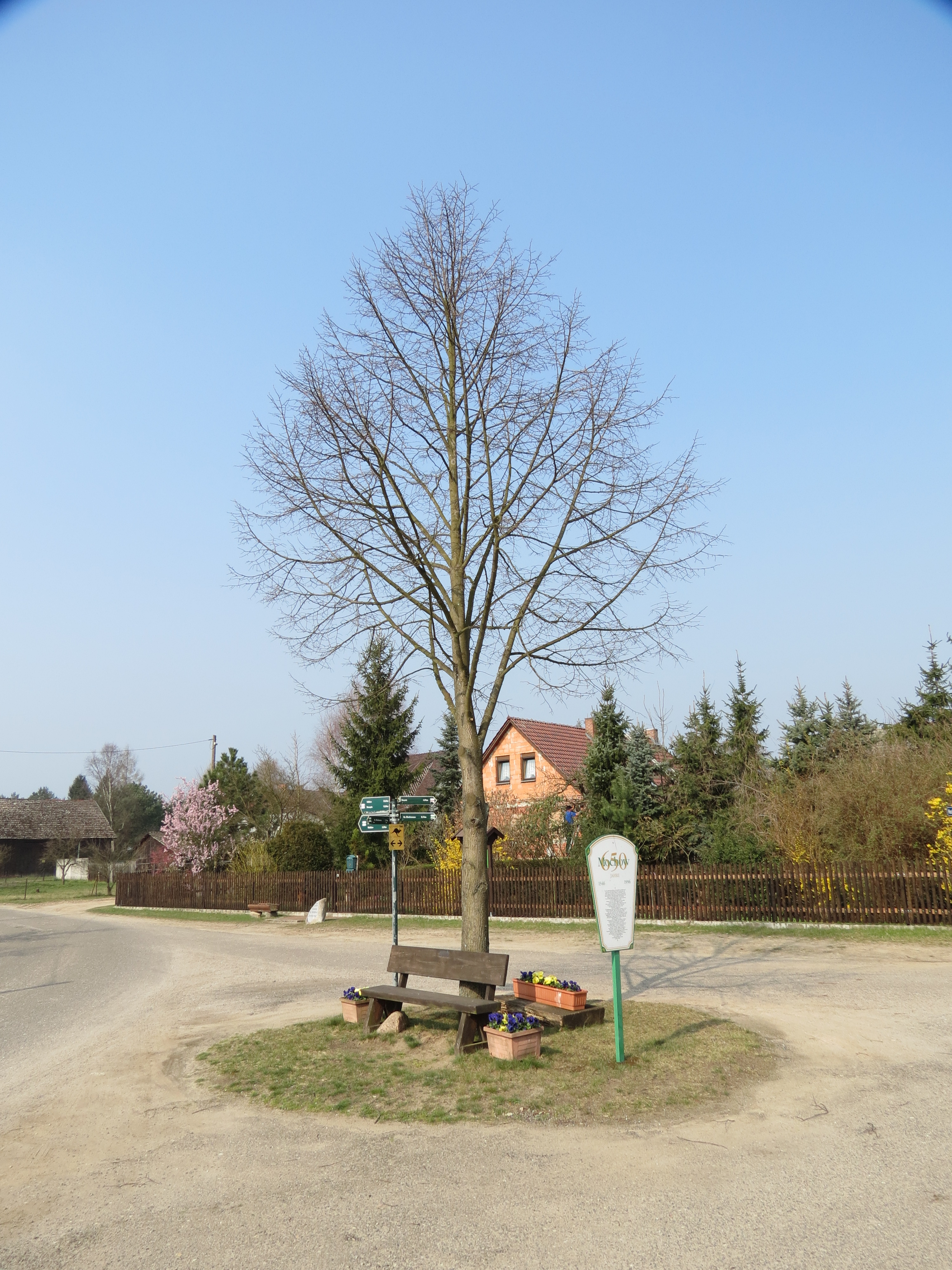 Dorfplatz Mochow, mit Erklärungstafel zur Ortsgeschichte, Mochow, Ortsteil der Gemeinde Schwielochsee, Landkreis Dahme-Spreewald, Brandenburg, Deutschland